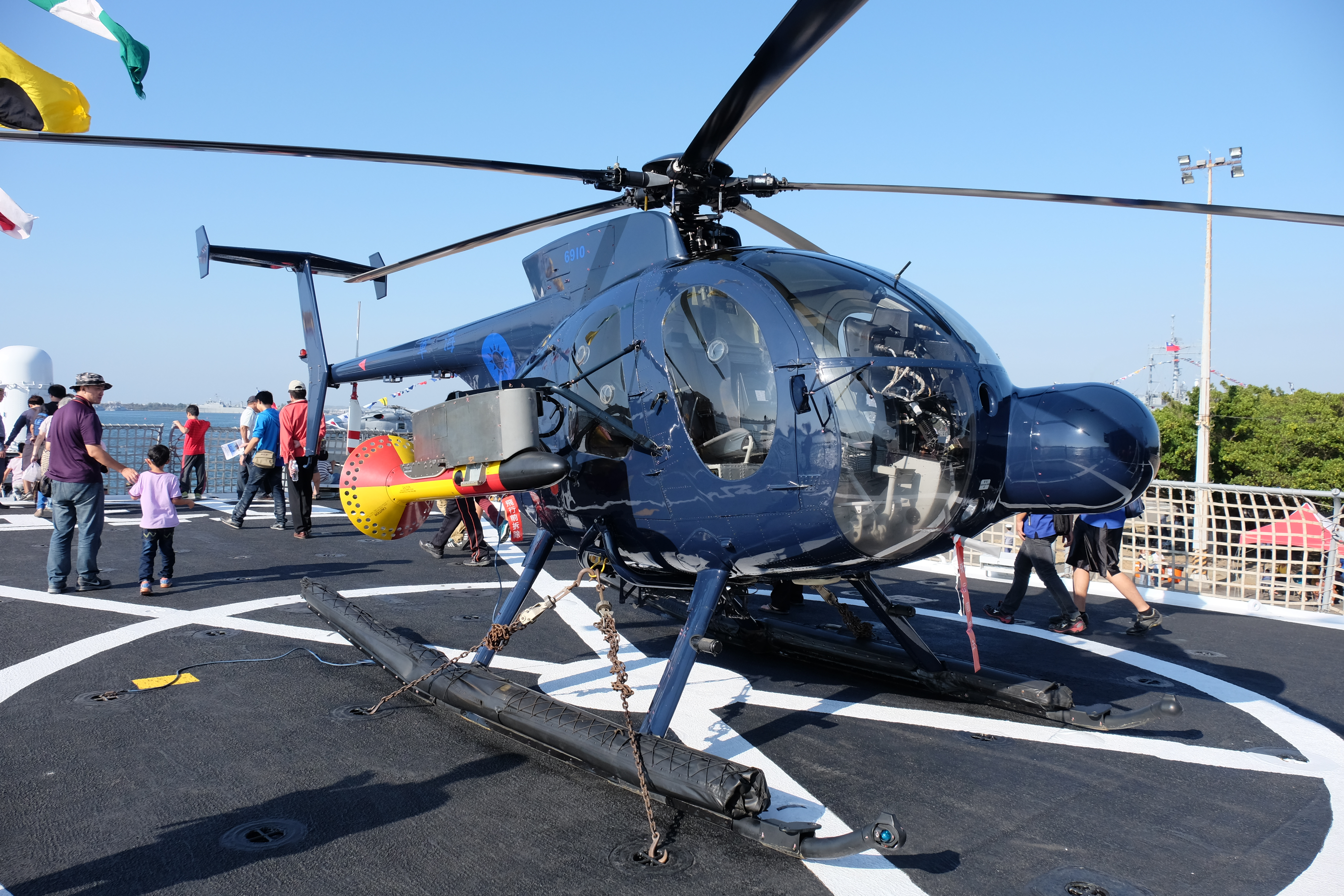 巡防艦蘭陽（FFG-935）艦尾直升機甲板上搭載的休斯500直升機6910右前方，攝於2014年左營軍港營區開放活動。